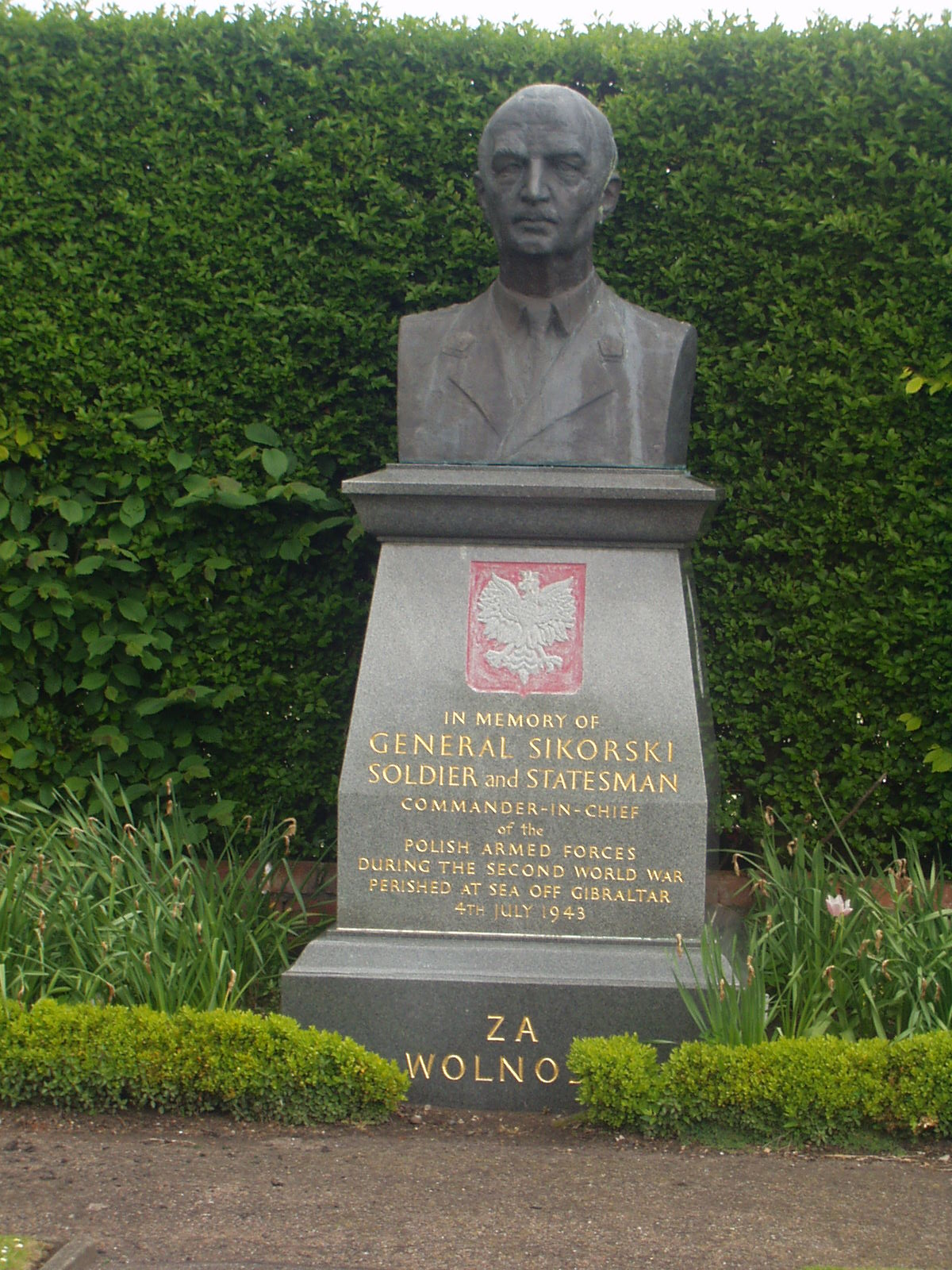 St.Andrews. Popiersie gen.Sikorskiego w Park Kinburn(ufundowane przez weteranów od Maczka i Sosabowskiego).